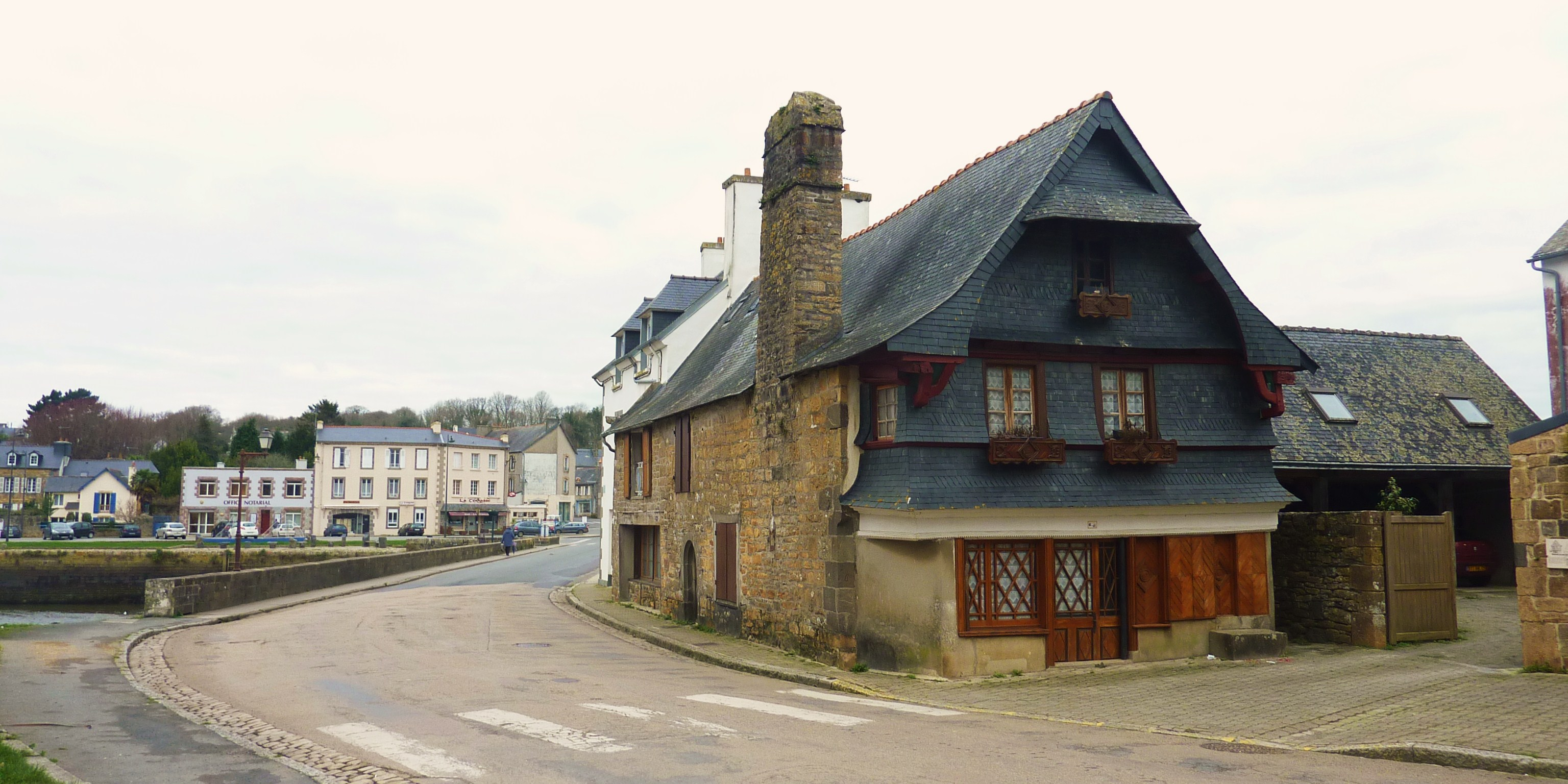 LeFaou : maison ancienne à pan de bois couvert d'ardoises près du pont